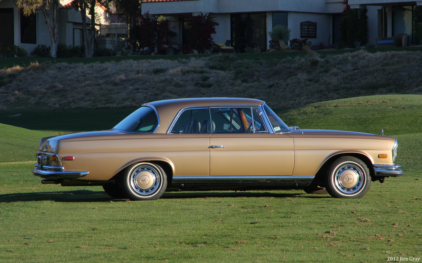 1971 Mercedes-Benz 280SE Coupe - svr